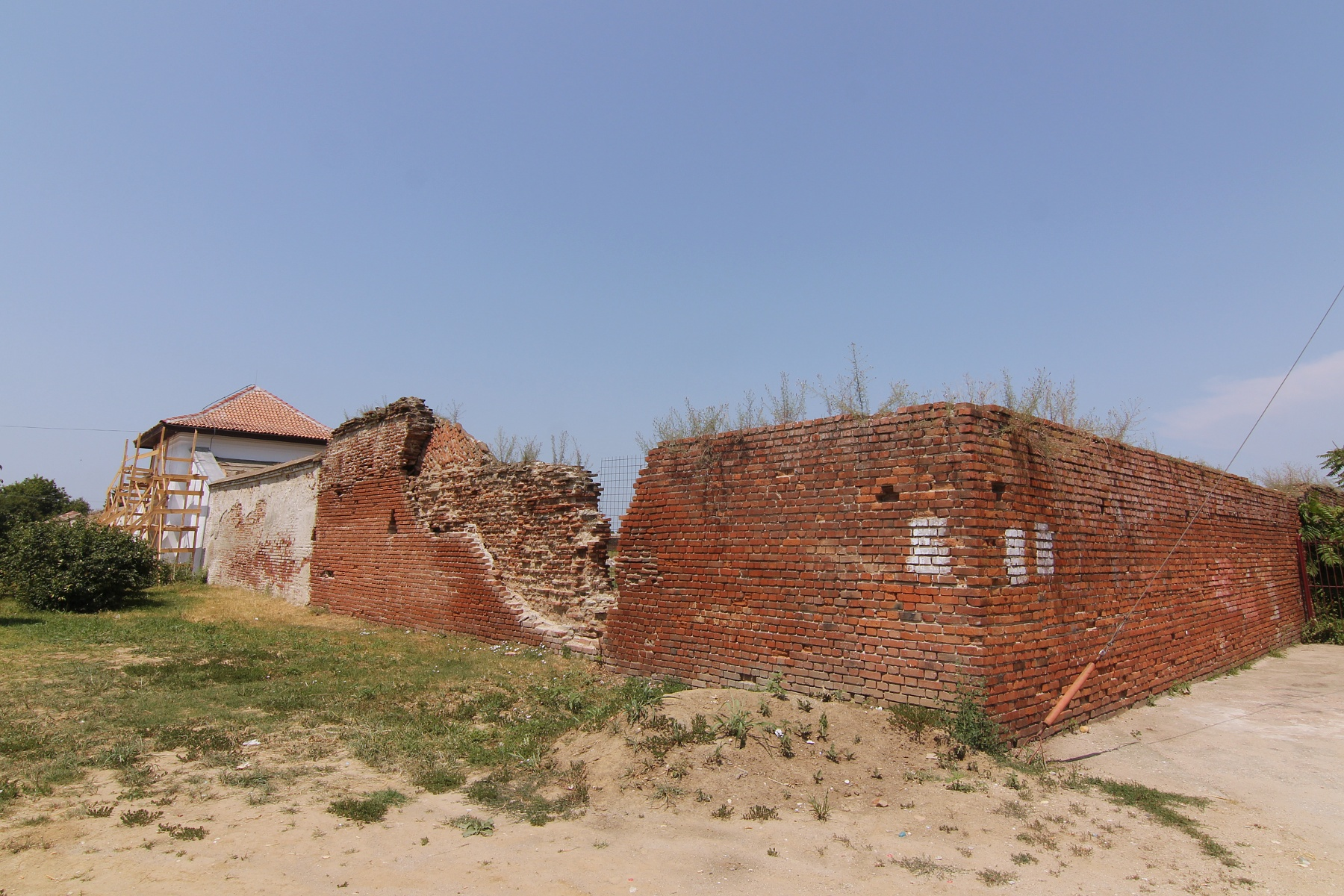 Curtea Brâncovenească 08